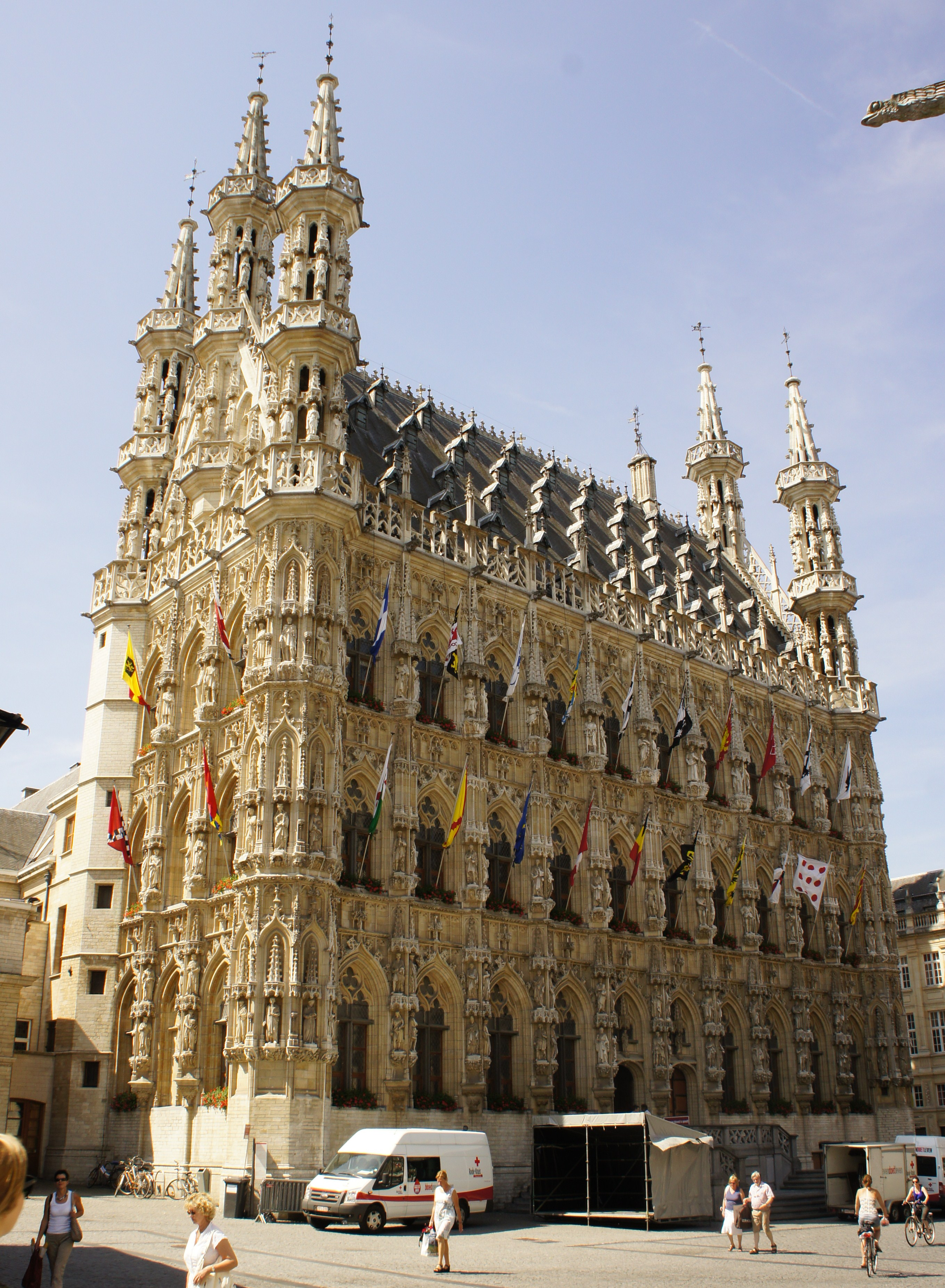 Het stadhuis, gebouwd door Sulpitius van Vorst (gestorven in 1439), daarna werden de werken overgenomen door de nieuwe bouwmeester Jan II Keldermans, die in 1445 overleed, en daarna nam Matthijs de Layens de werken over. Hij was een leerling geweest van Sulpitius. De werken vonden plaats tussen 1439 en 1469 en het is Brabantse laatgotiek. De ontvangstzaal in het stadhuis, waar enkele waardevolle schilderijen hangen, dateert uit 1750.